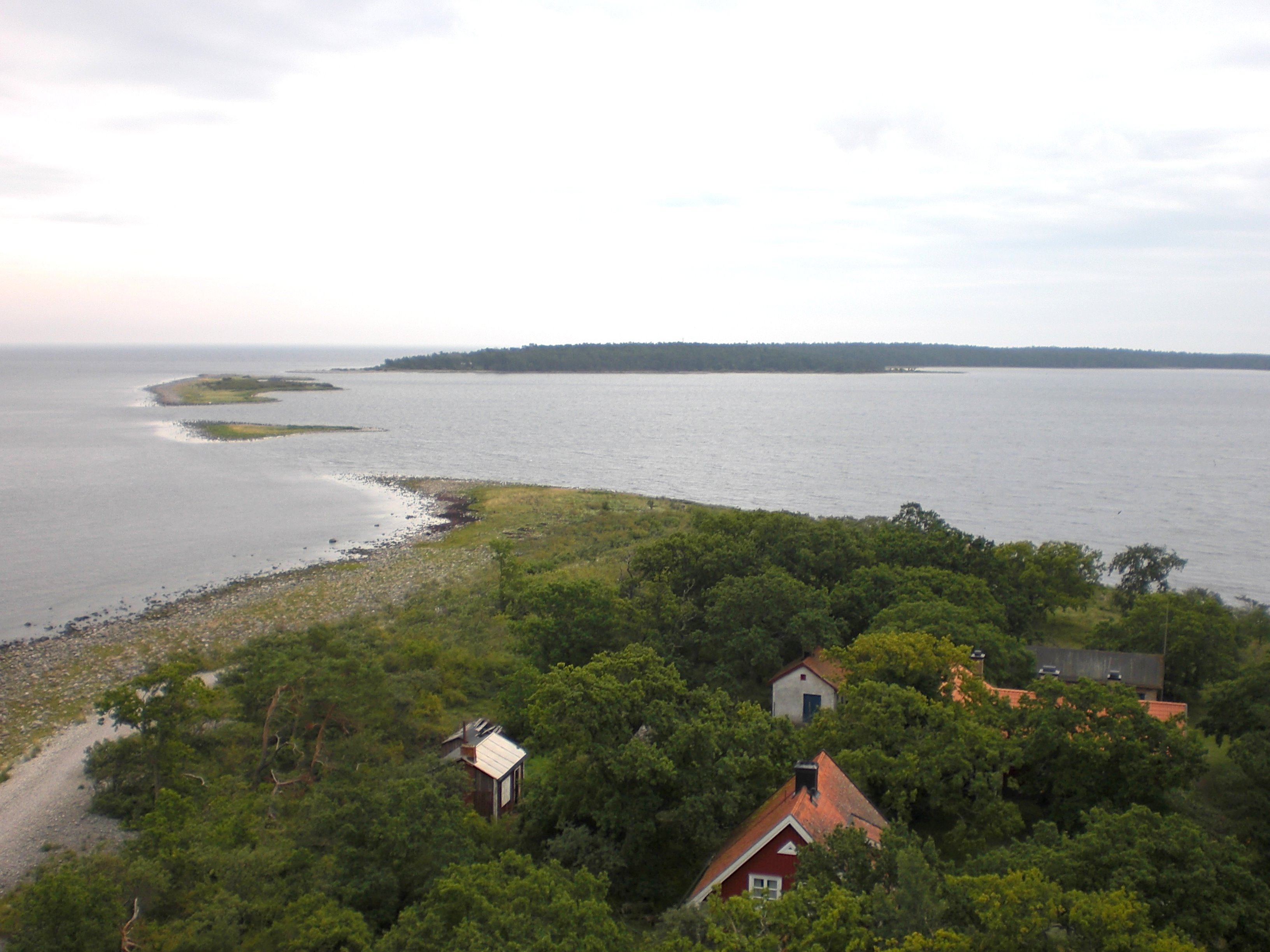 Blick vom Leuchtturm Lange Erik auf Öland in Richtung Osten